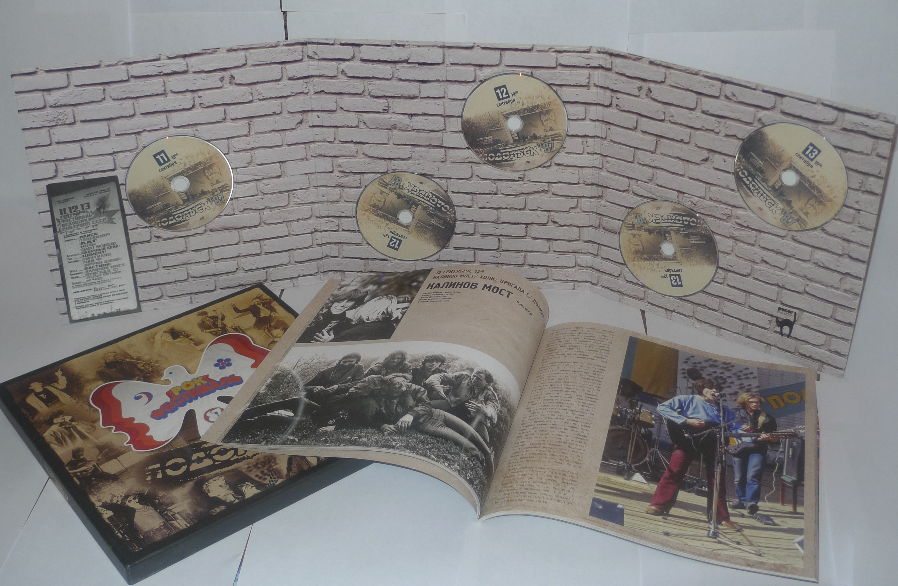 Комплект DVD Подольск 87 274